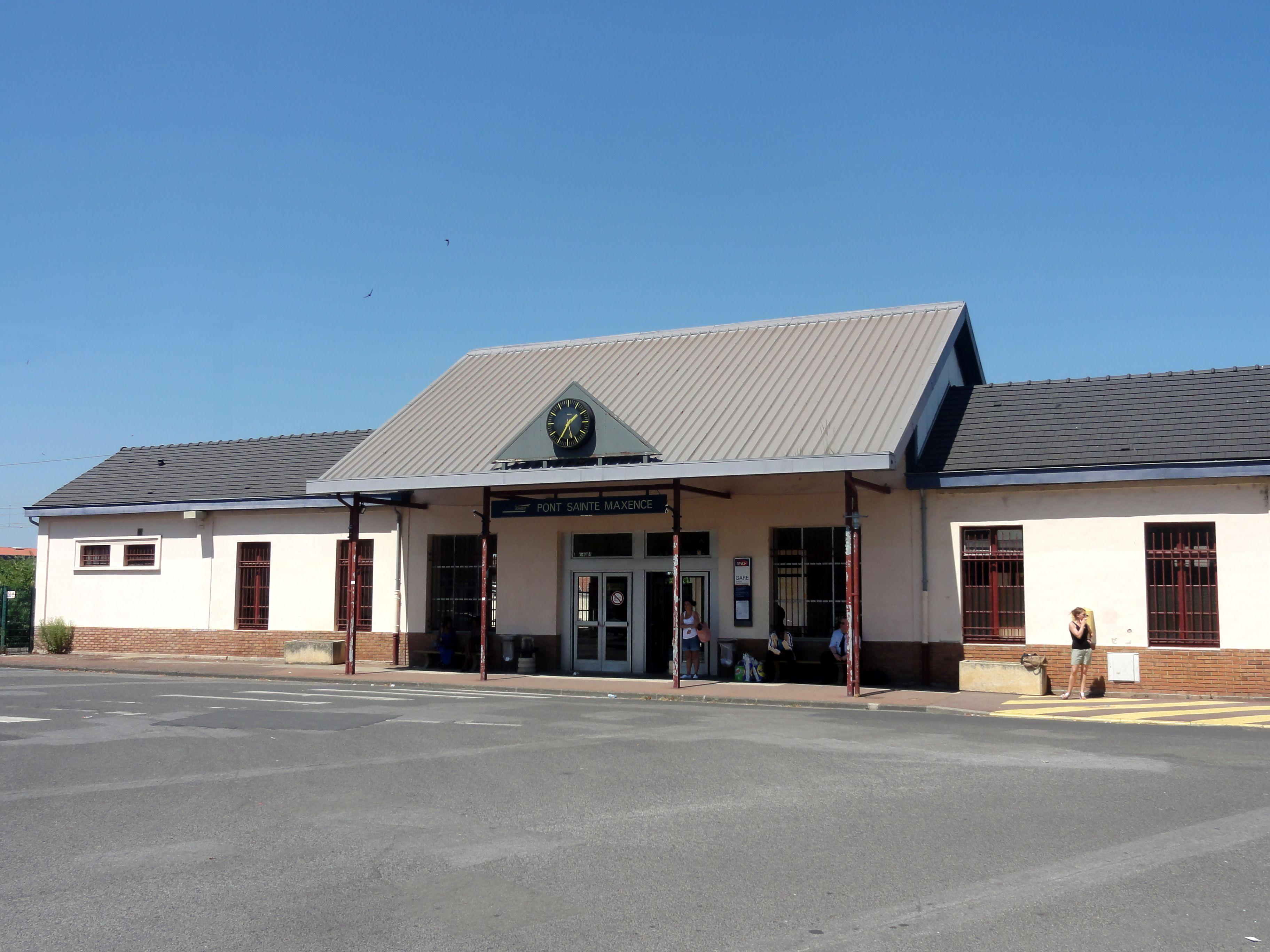 Bâtiment-voyageurs, côté ville.